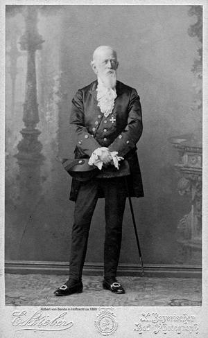 Politiker Robert von Benda, etwa 1899